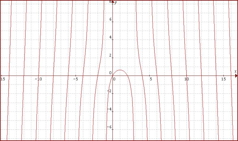 Kvadratrix kiterjesztése a valós számokra, nagyobb intervallumon